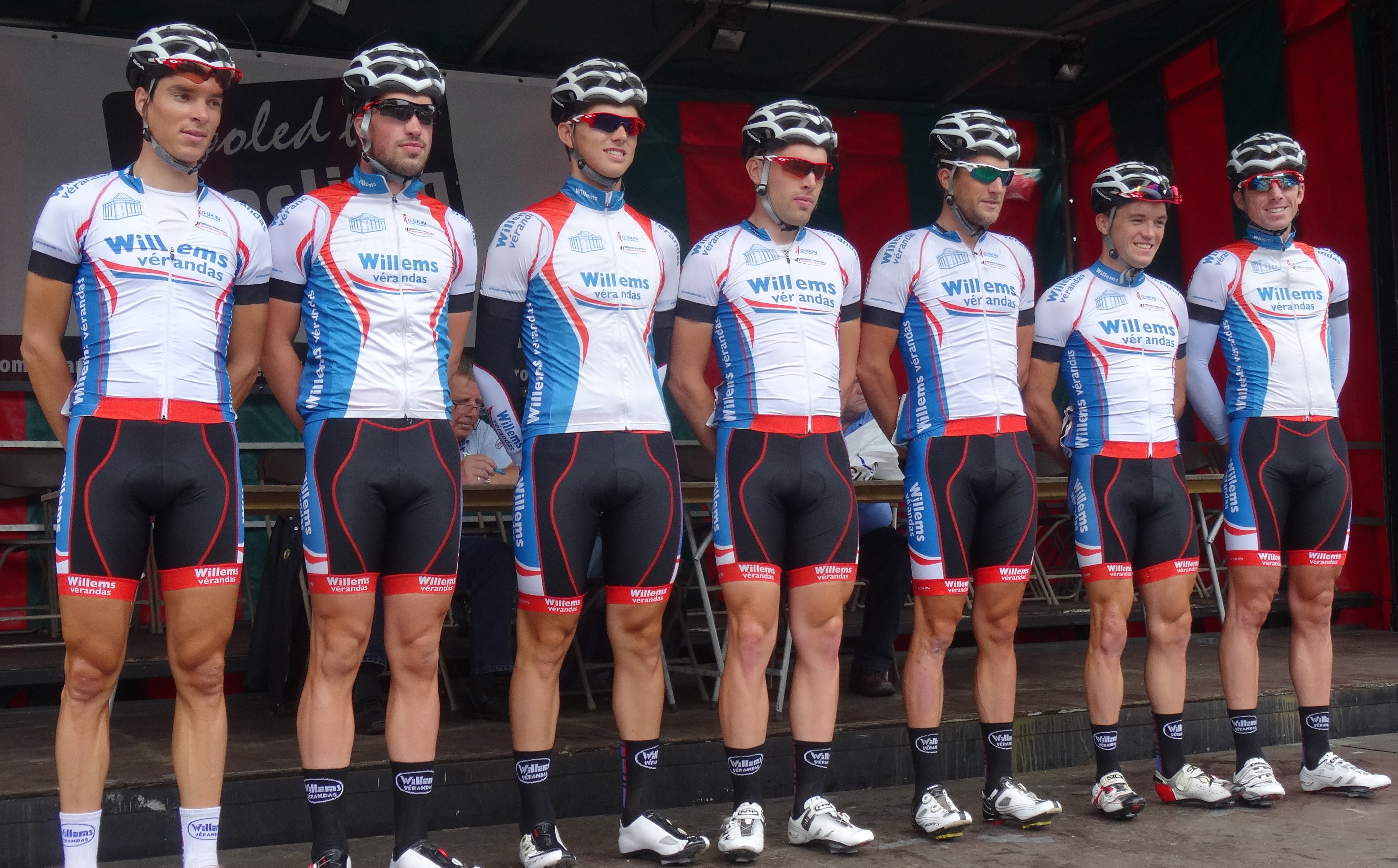 Reportage photographique réalisé le dimanche 10 août à l'occasion du départ et de l'arrivée de la Flèche du port d'Anvers 2014 à Merksem (Anvers), Belgique.